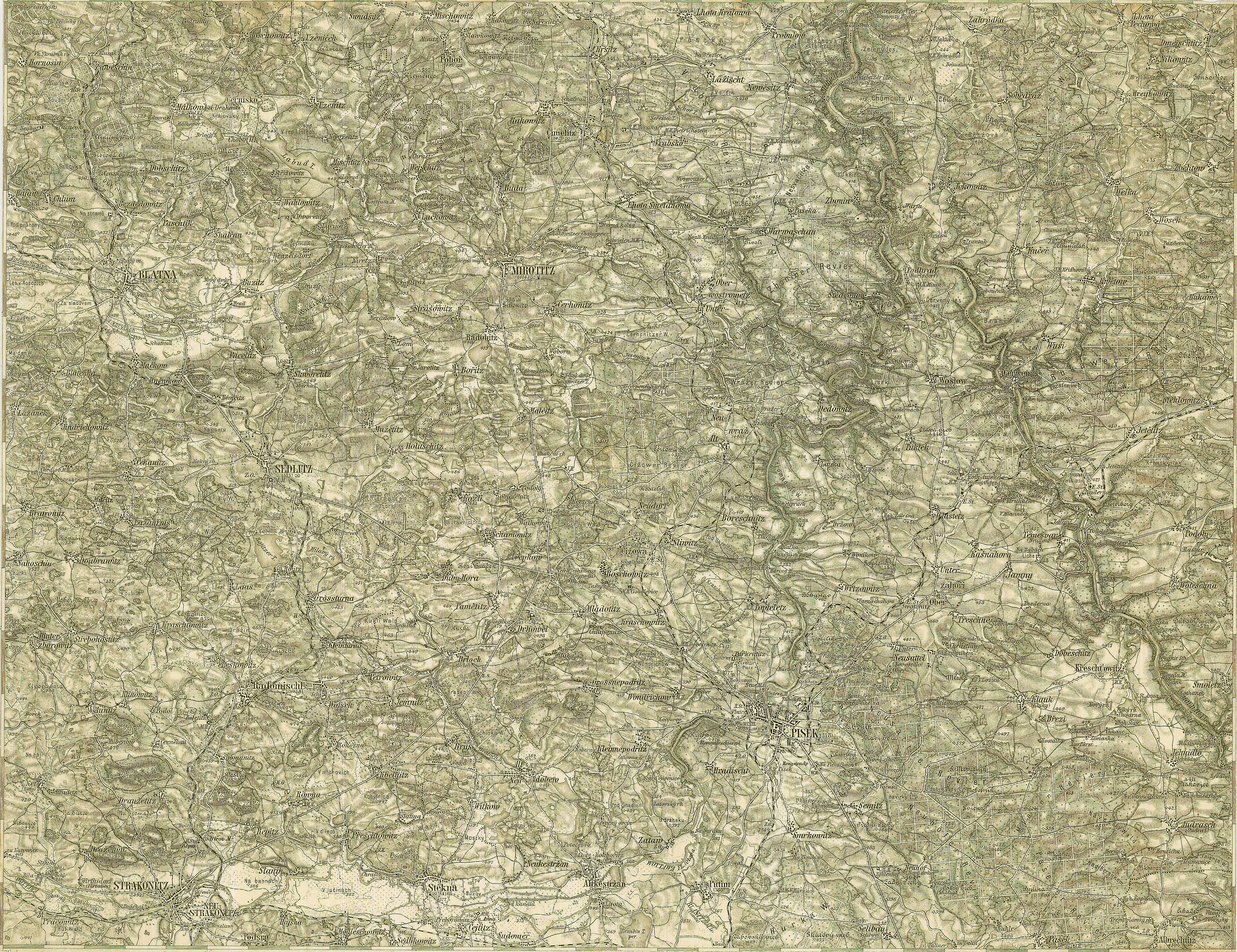 historische Landkarte: Spezialkarte 1:75.000, franzisco-josephinische (3.) Landesaufnahme der österreichisch-ungarischen Monarchie. Blatt 4252 (Zone 8 Kol. X, laut Rückseite des Scanoriginals) Pisek und Blatna.